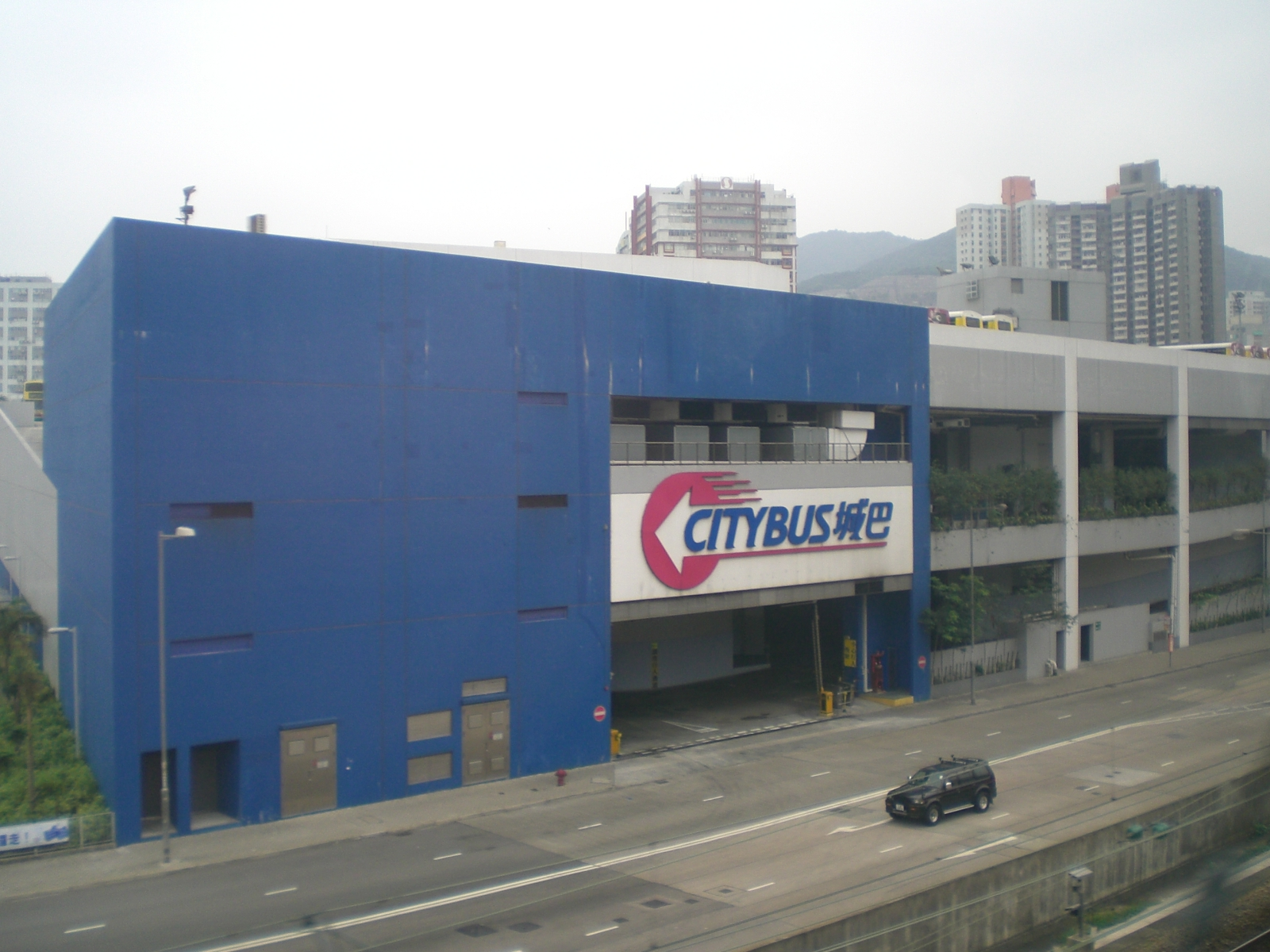 城巴, Citybus (Hong Kong), Chai Wan 柴灣車廠. By me.